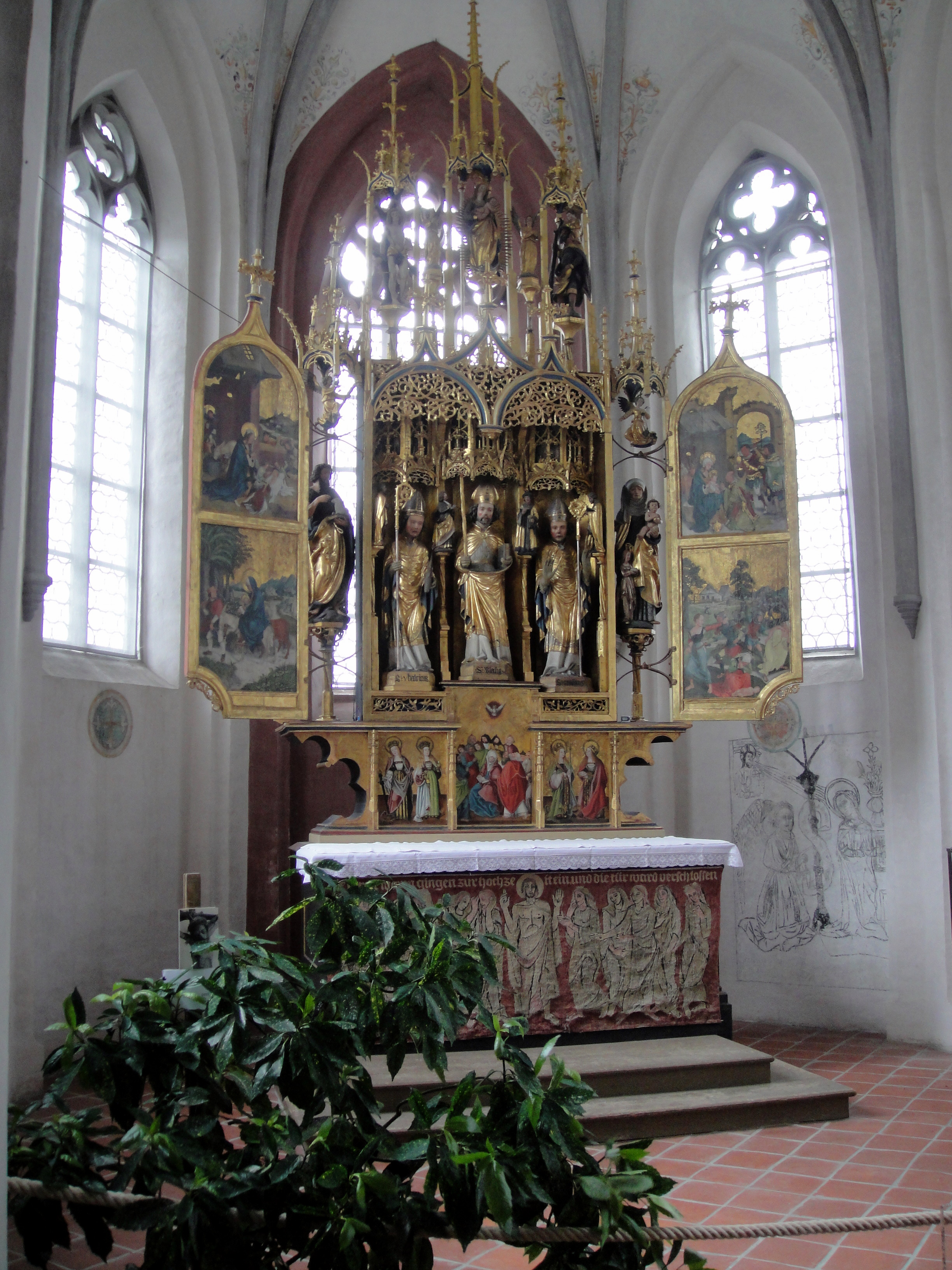 Altar in St. Blasius, Kaufbeuren